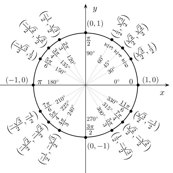 Կոսինուսի և սինուսի արժեքները շրջանագծի վրա